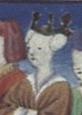 Constance of Sicily, Queen of Aragon